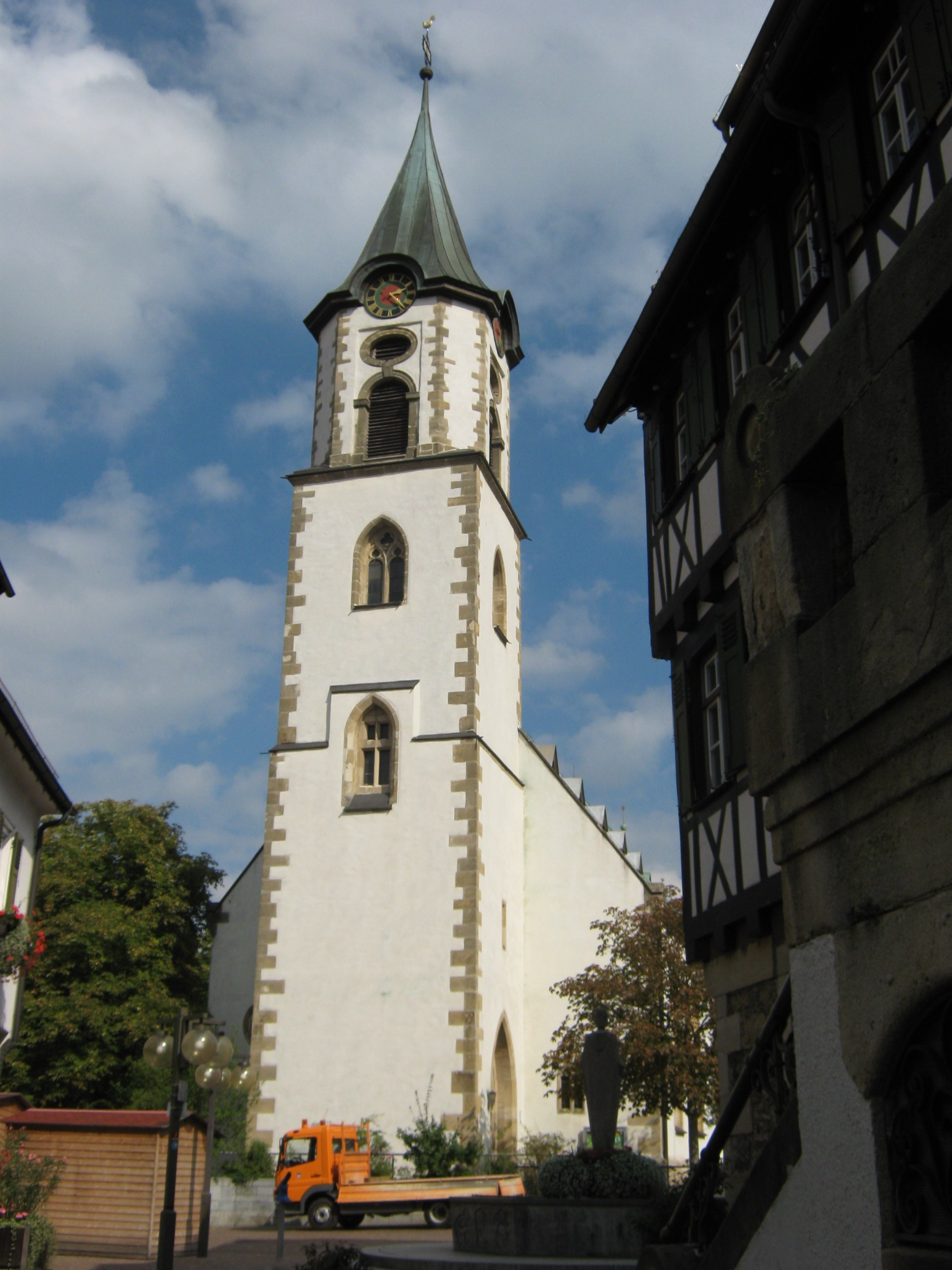 Die Martinskirche in Pfullingen ist die Urkirche des Pfullichgaus. Um 620 als Holzkirche, um 760 als karolingische Steinkirche und um 930 als frühromanische Kirche mit kreuzförmigem Grundriss umgebaut. Die dreischiffige staufische Säulenbasilika wurde 1150 errichtet, der spätgotische Chor 1463. Das Langhaus wurde 1579 modernisiert und das barocke obere Turmgeschoß mit achtseitgem Spitzhelm 1773 aufgesetzt. 1982 fand eine weitere Renovierung statt.